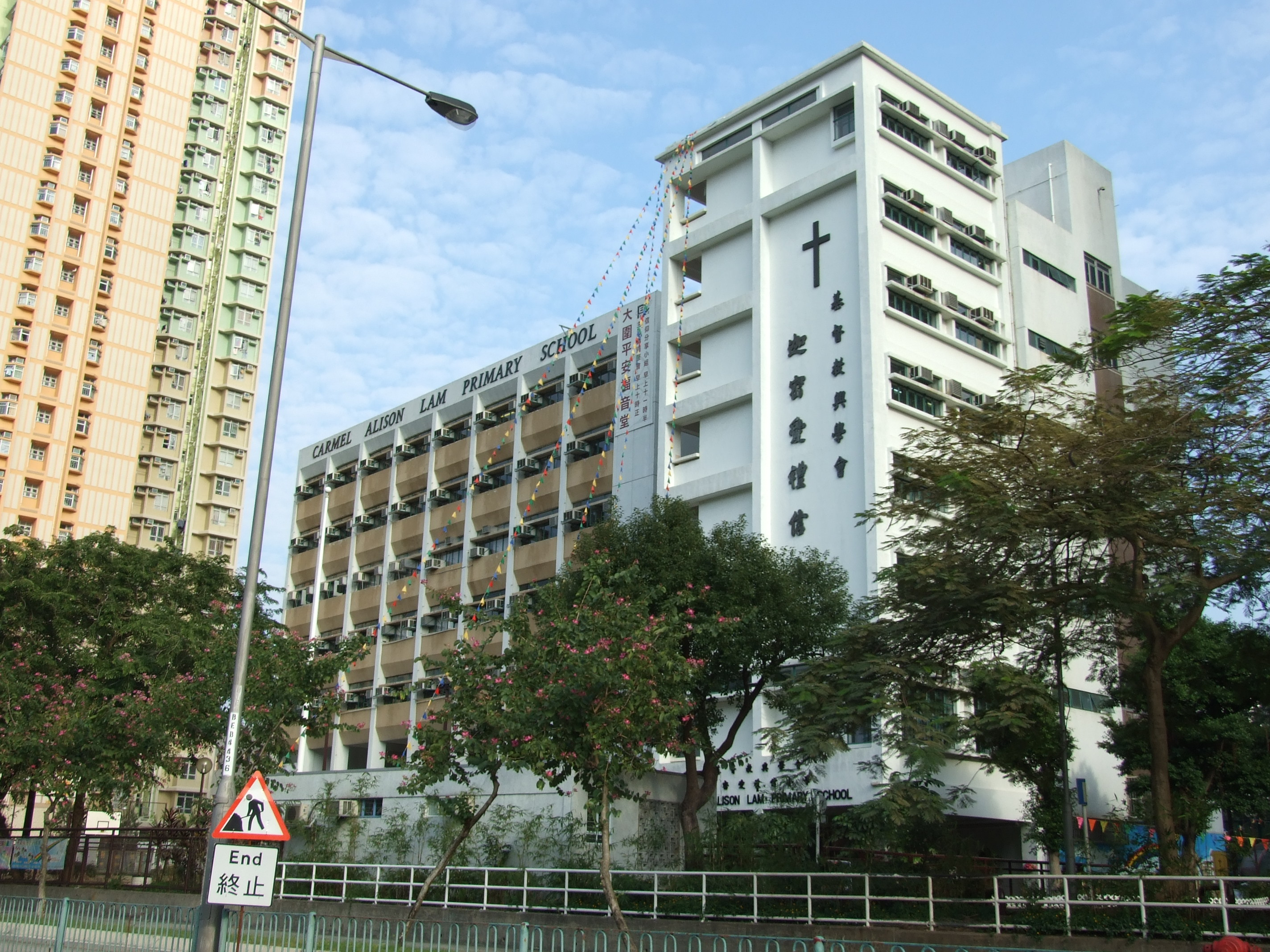 迦密愛禮信小學